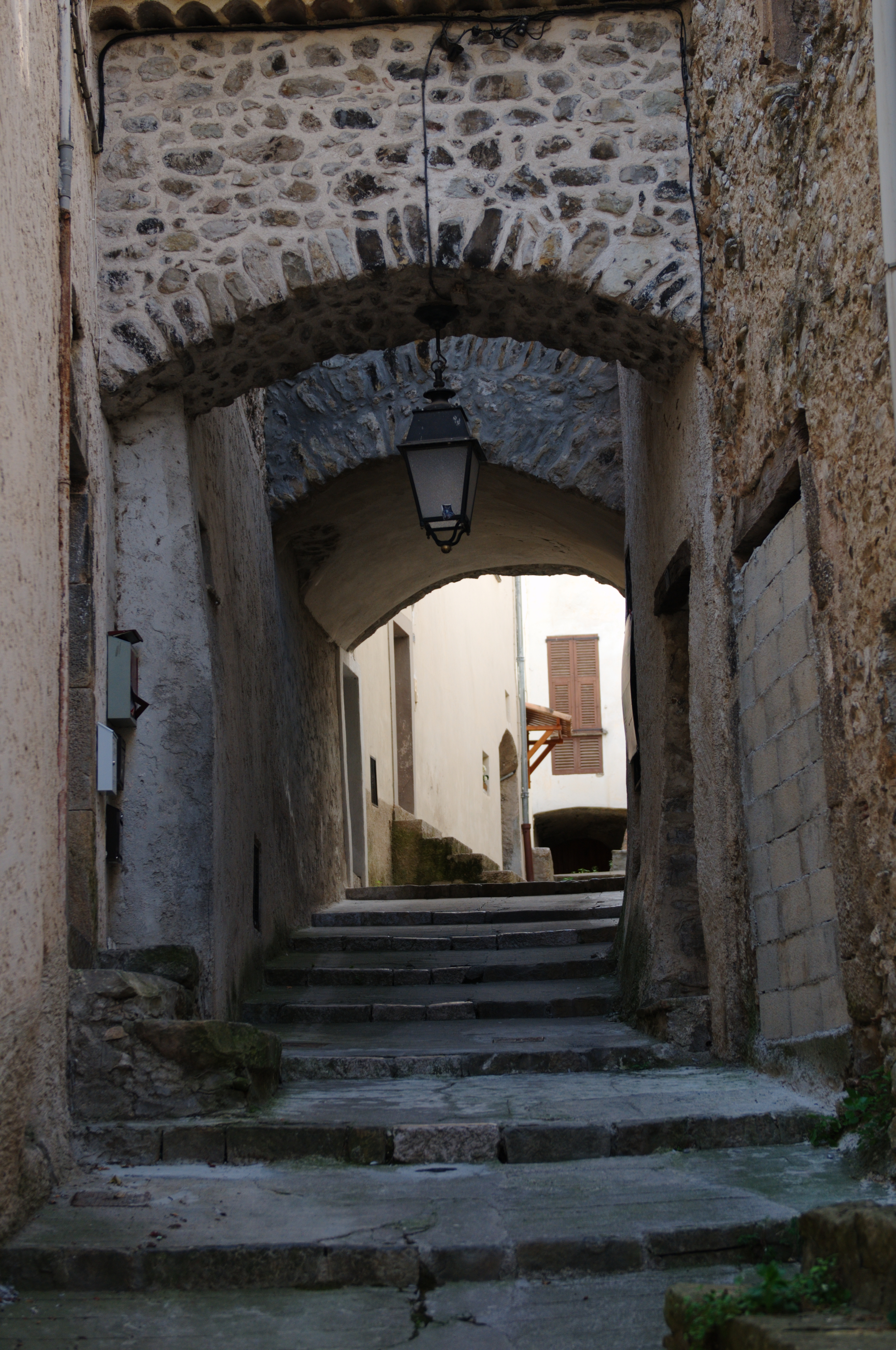 Photo d'une rue de Roquesteron